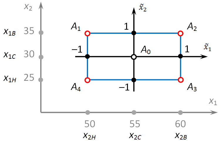 Переход к нормированным координатам при проведени полного факторного эксперимента